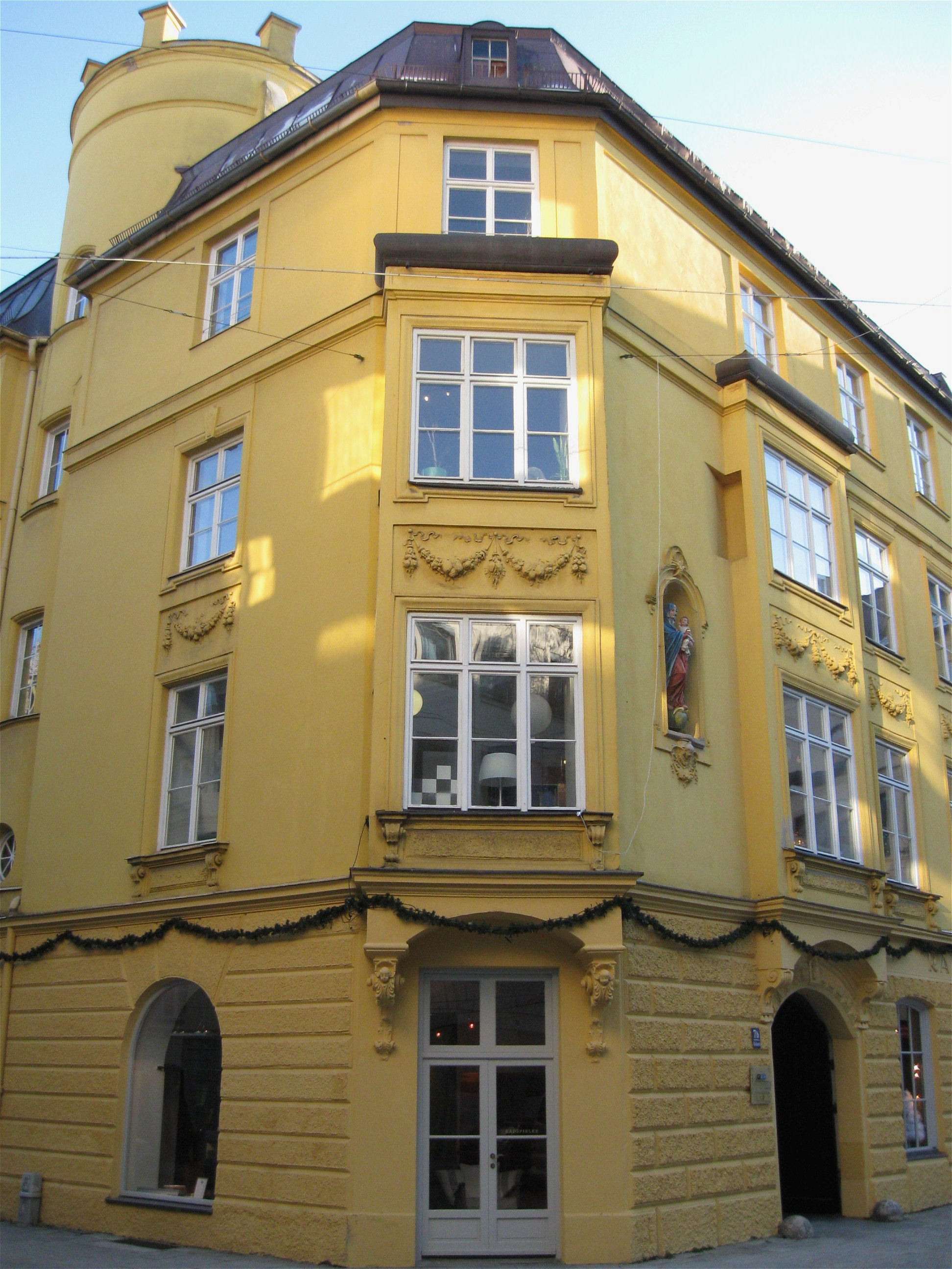 München, Hackenstraße 7; Ehem. Palais Rechberg oder Radspielerhaus, stattlicher viergeschossiger Vierseitkomplex mit Treppenturm und nach Süden verlängertem Westflügel, erbaut 1678 und später erweitert, verändert um 1817 durch Jean-Baptiste Métivier (der hier wohnte), 1871/75 weitgehend umgebaut und aufgestockt (neue straßenseitige Fassaden), Nordflügel 1874/75 nach Osten durch Anbau mit straßenseitigem Schweifgiebel verlängert, Fassadengestaltung von Peter (?) Berger